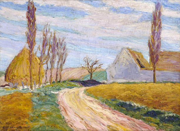 Paisaje de Plaisir Grignon - óleo sobre tela - 95 cm. x 100 cm. - Museo Castagnino